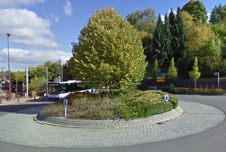 rond point central de Rumelange